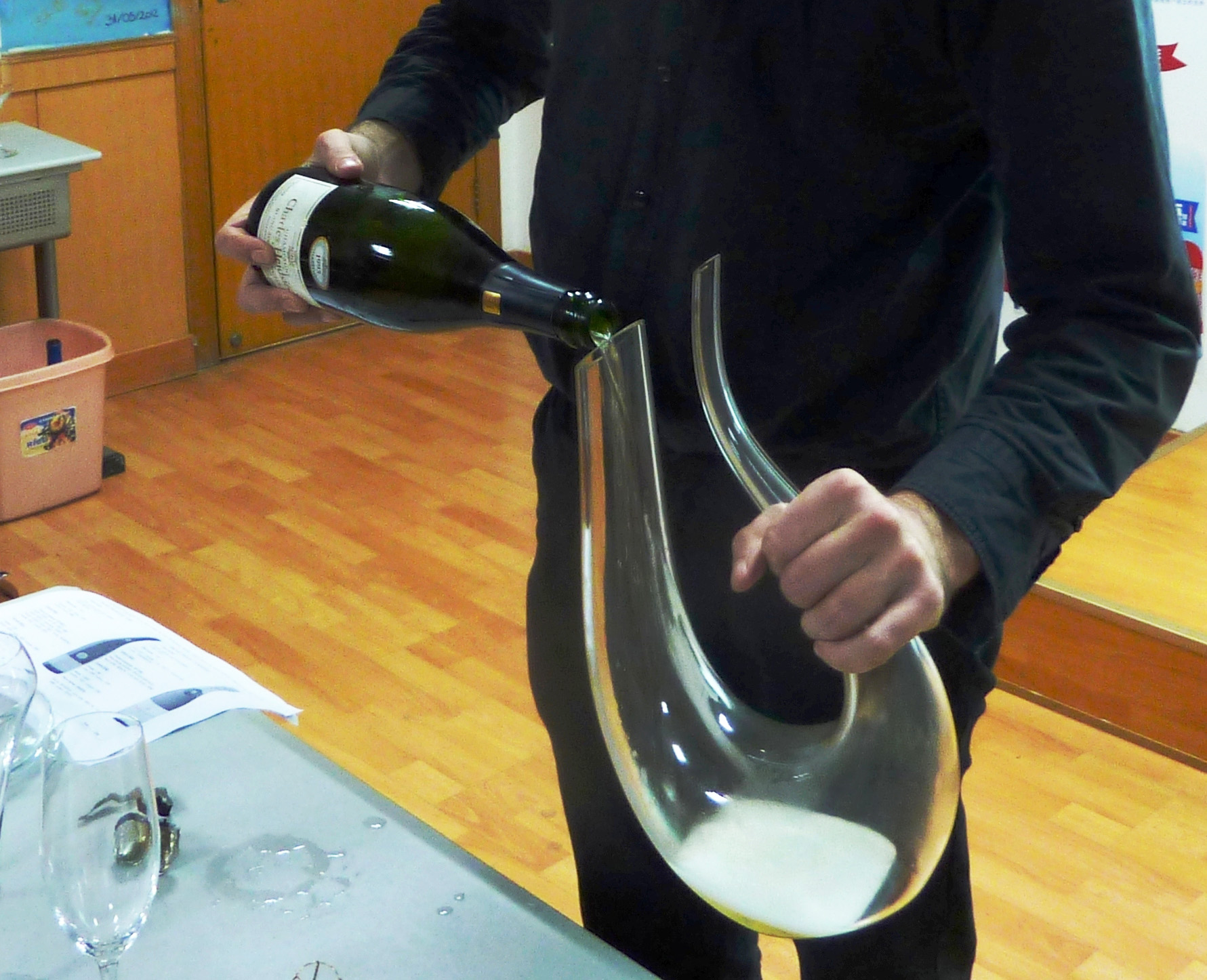 Carafage du champagne à l'Alliance française de Wuhan (